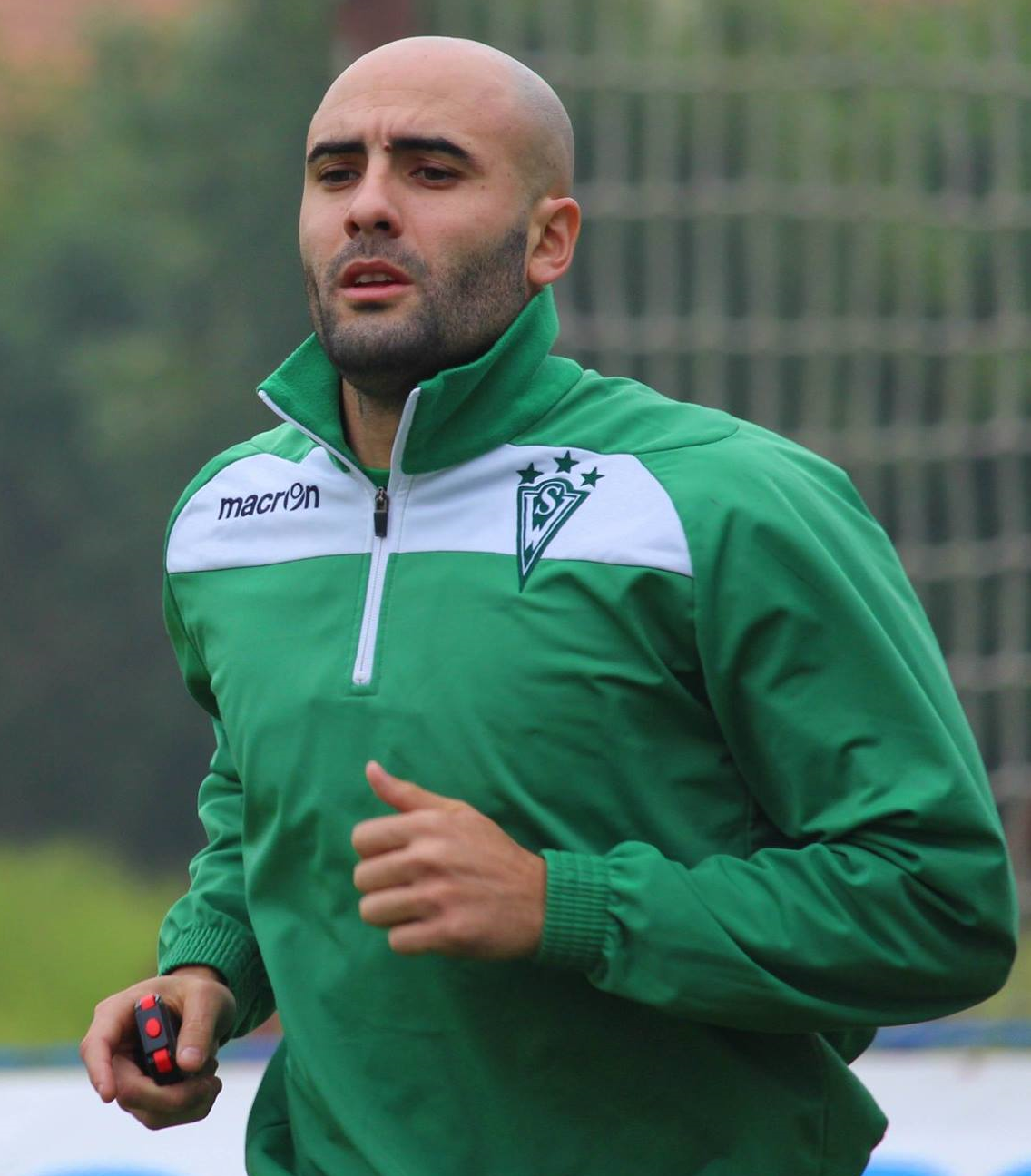 Fotografía de Federico Pérez, futbolista profesional.